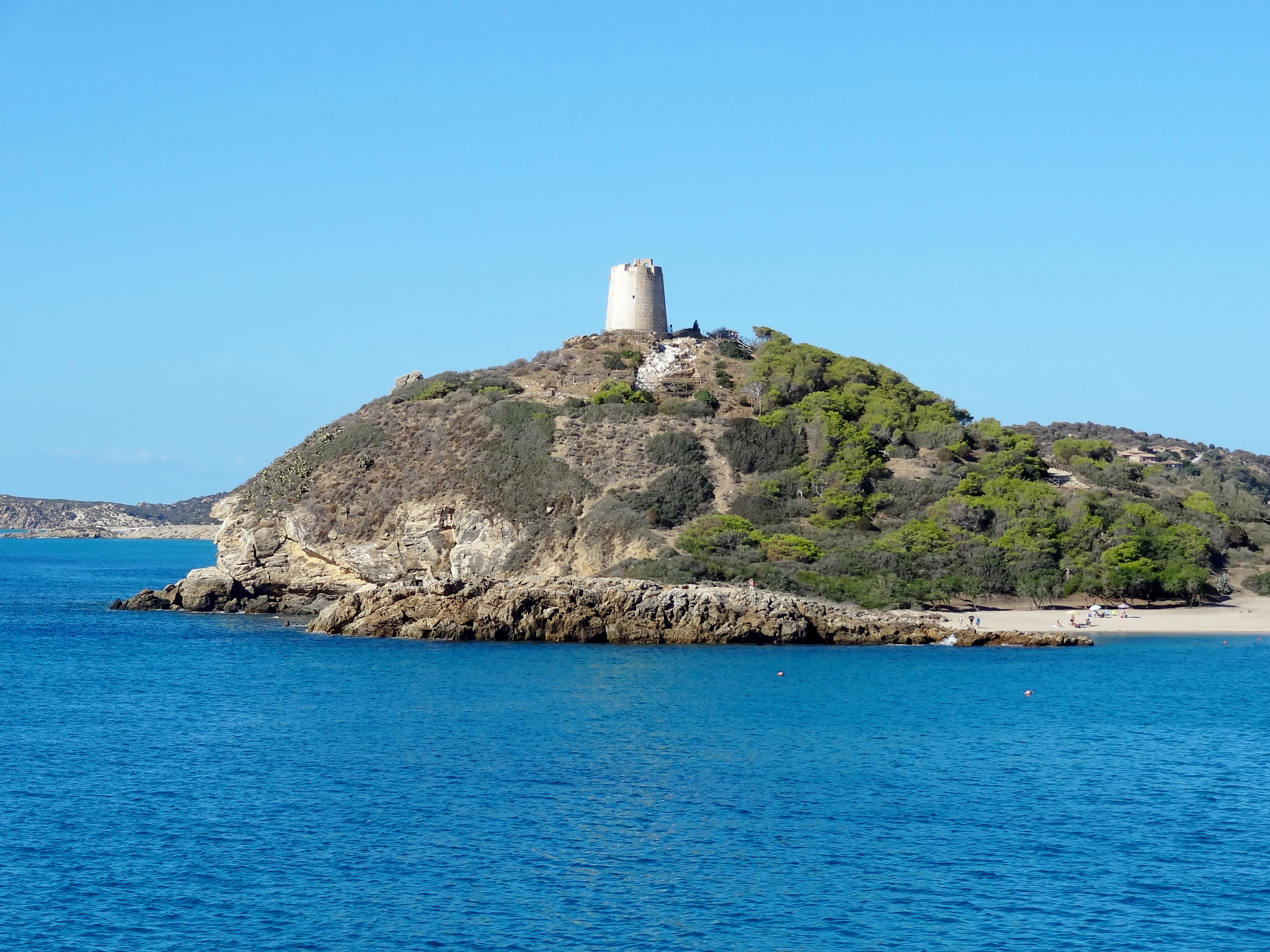 Turm von Chia (Torre di Chia), Gemeinde Domus de Maria, Sardinien, Italien